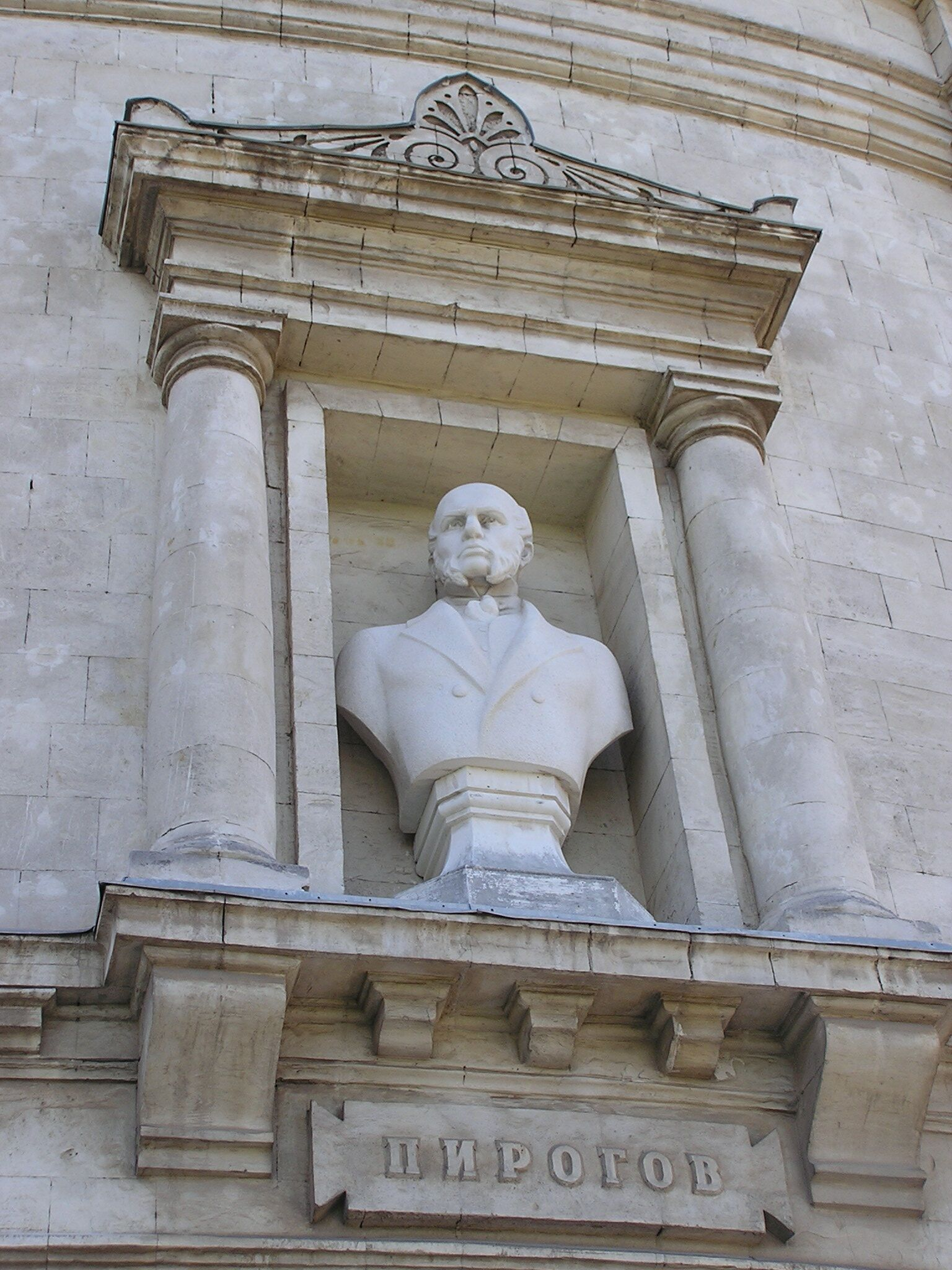 Севастополь. Бюст Пирогова